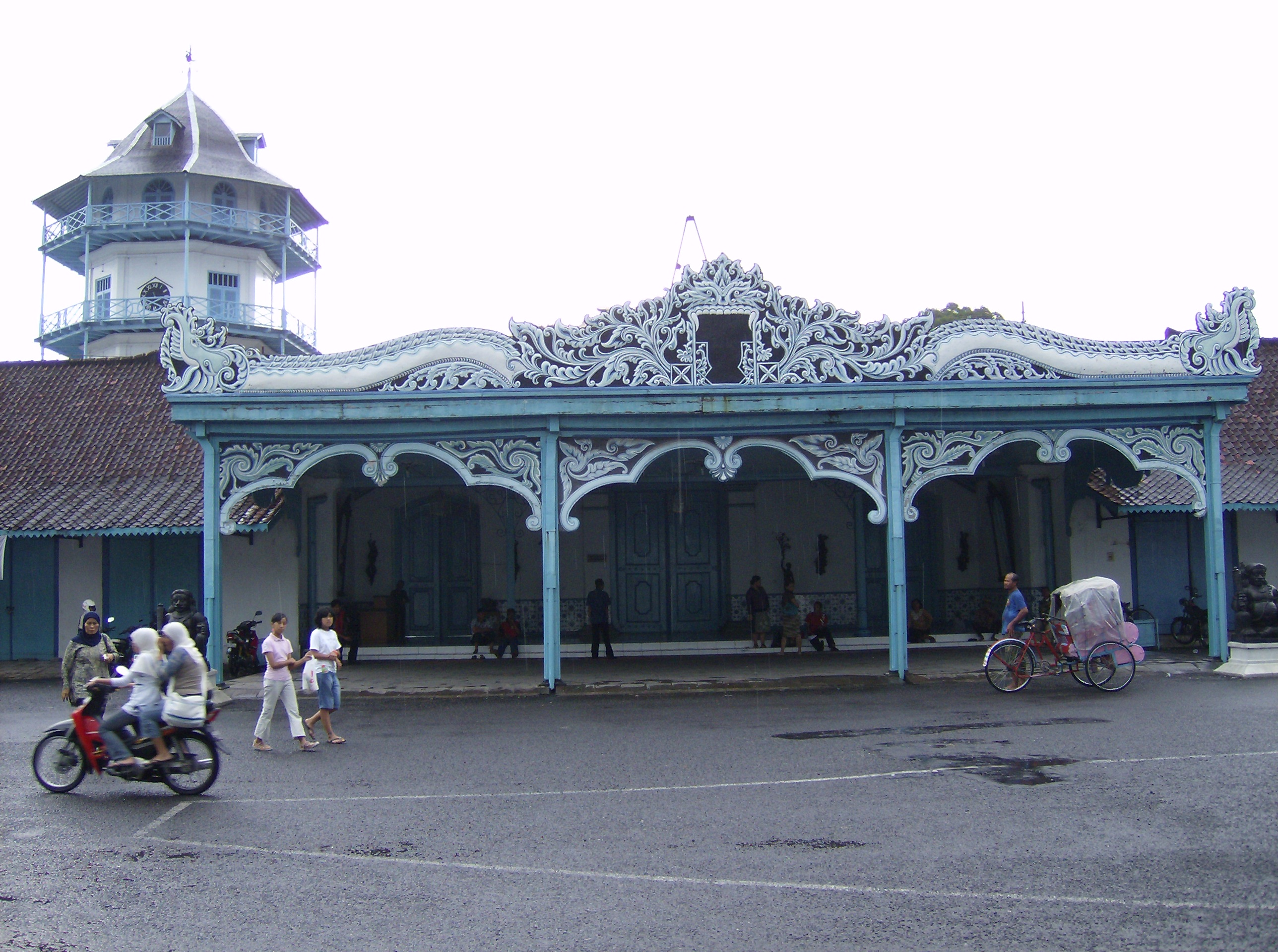 Made by Meursault2004 aka Revo Arka Giri Soekatno